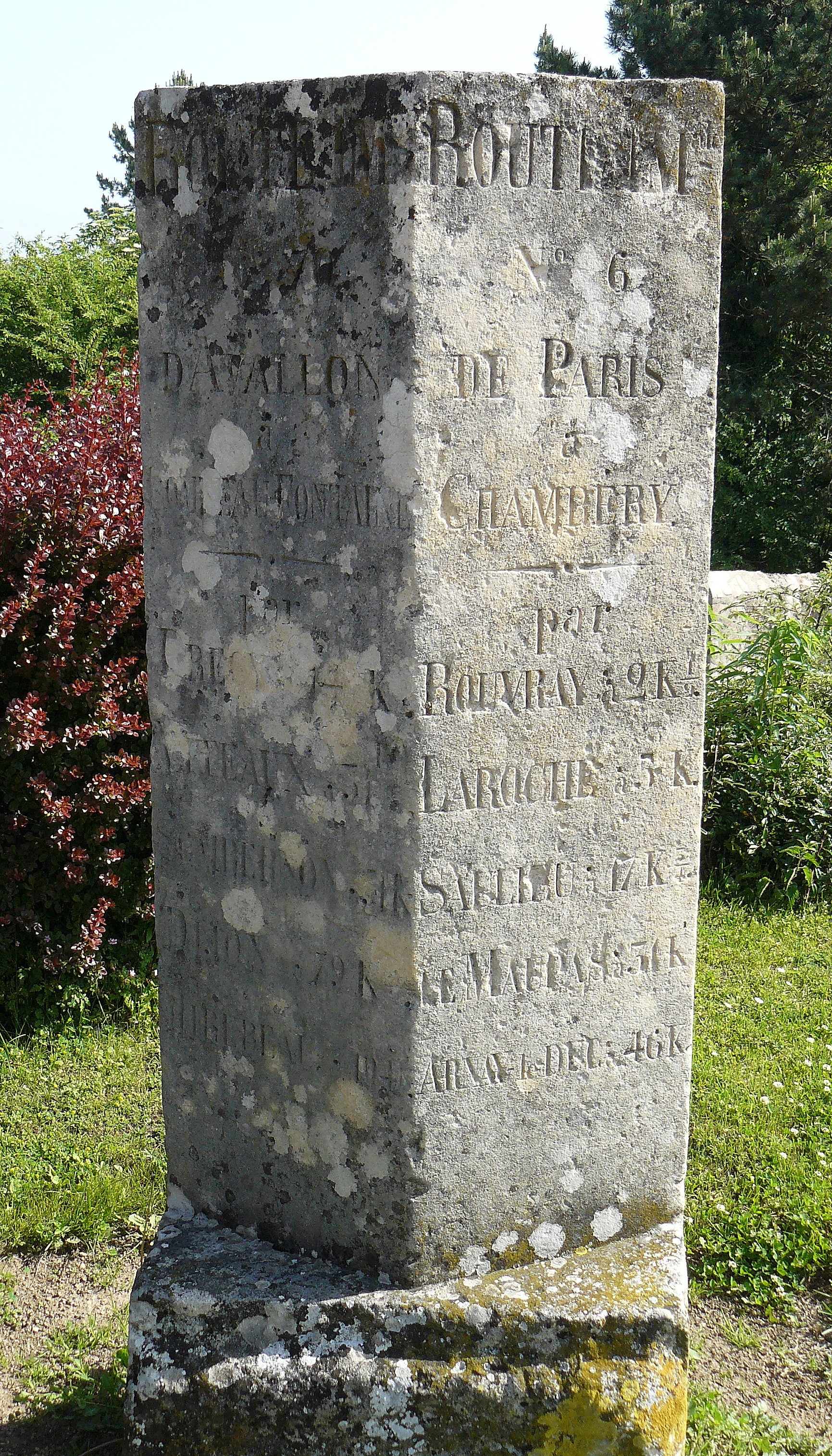 Borne ancienne de la Nationale 6, transplantée à Saulieu (Côte-d'Or, France)